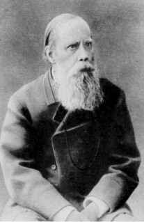 Saltykov-Schedrin (1826-1889)